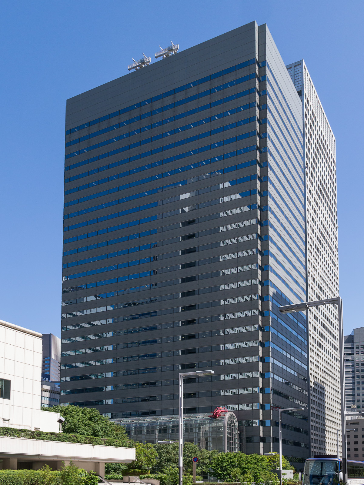 新宿モノリスビル、東京都新宿西新宿。